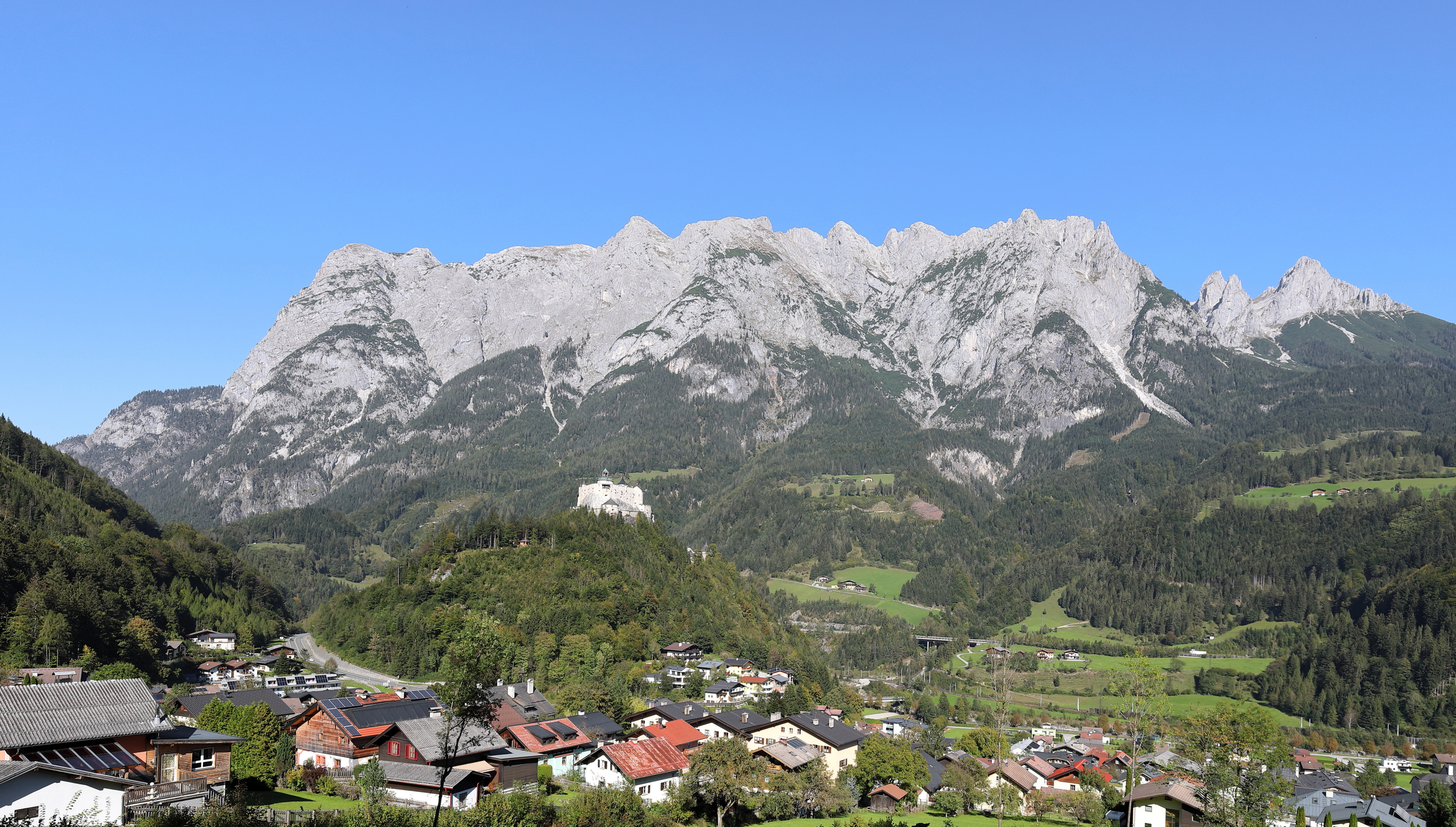 Südwestansicht des Tennengebirges im Bundesland Salzburg (Österreich). Im Vordergrund die Marktgemeinde Werfen und die Festung Hohenwerfen.